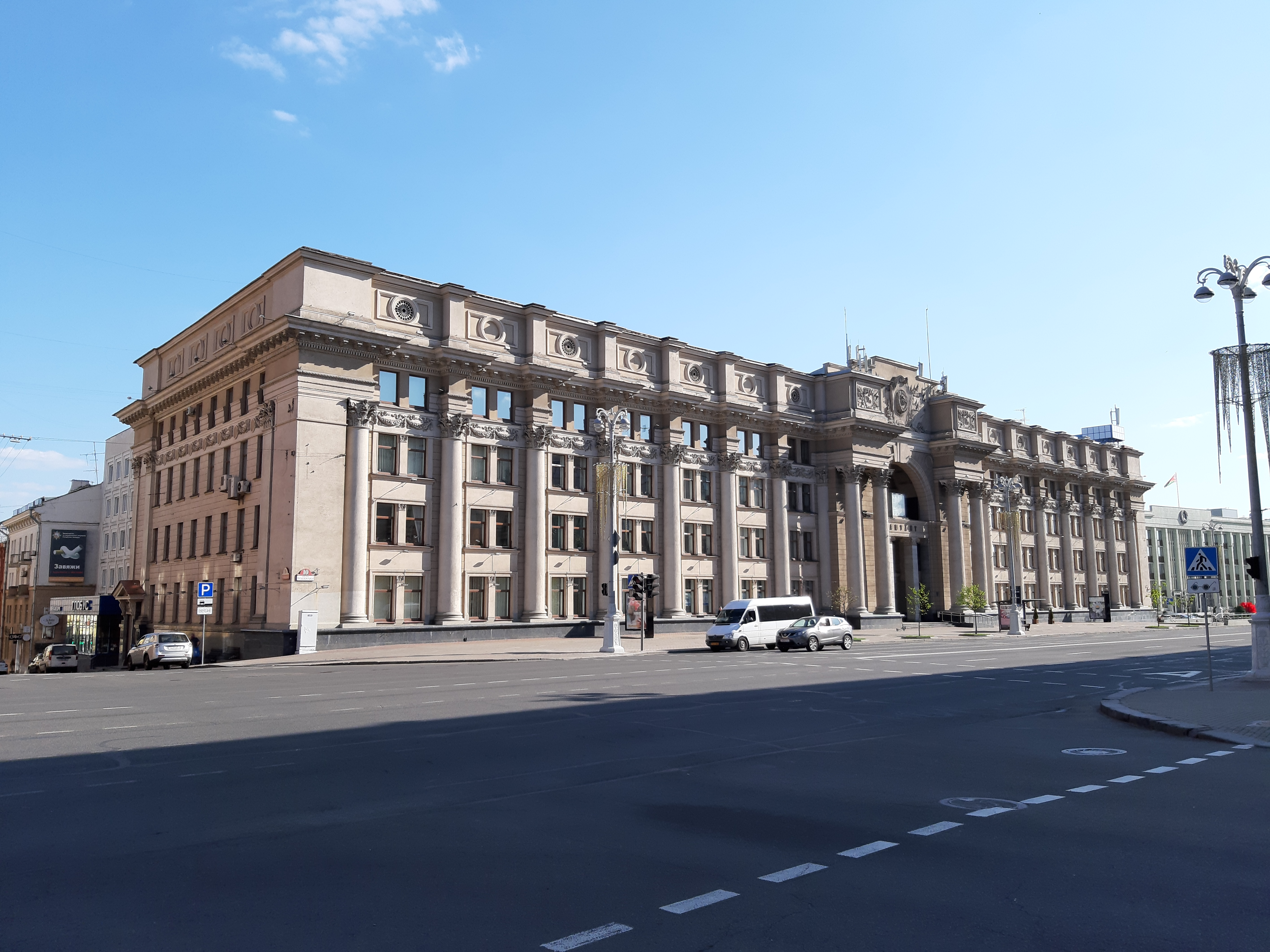 Мінск. Праспект Незалежнасці, май 2020